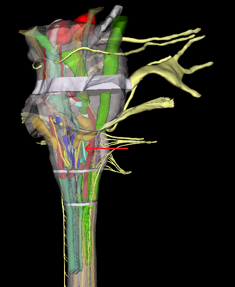 Enbor entzefalikoaren alboko ikuspegia da, geziak nukleo anbiguoa adierazten du.